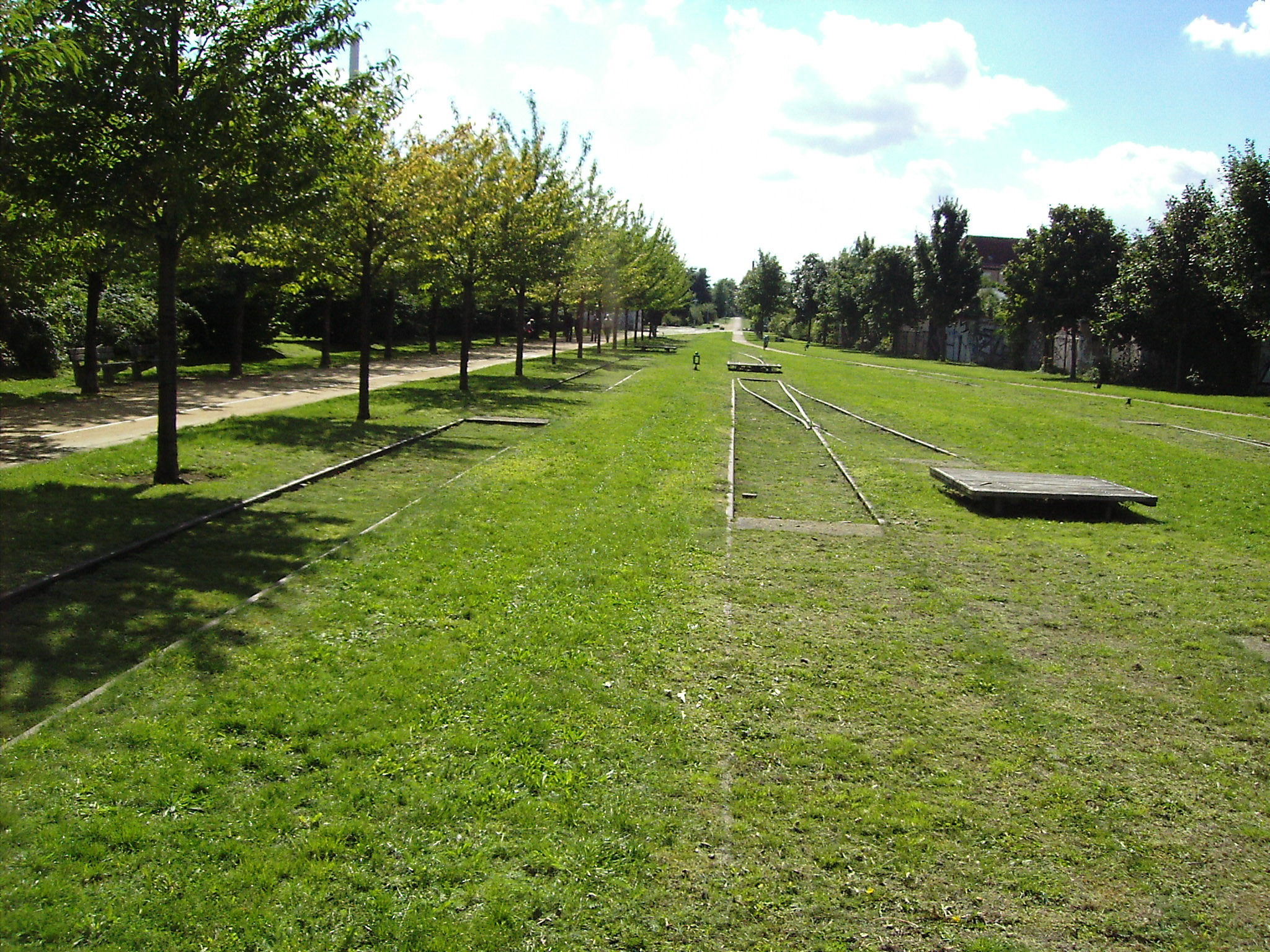 Halle Saale Alter Thüringer Güterbahnhof Südbereich, ehemaliger Stellwerksbereich Ht2 am 06.09.2010